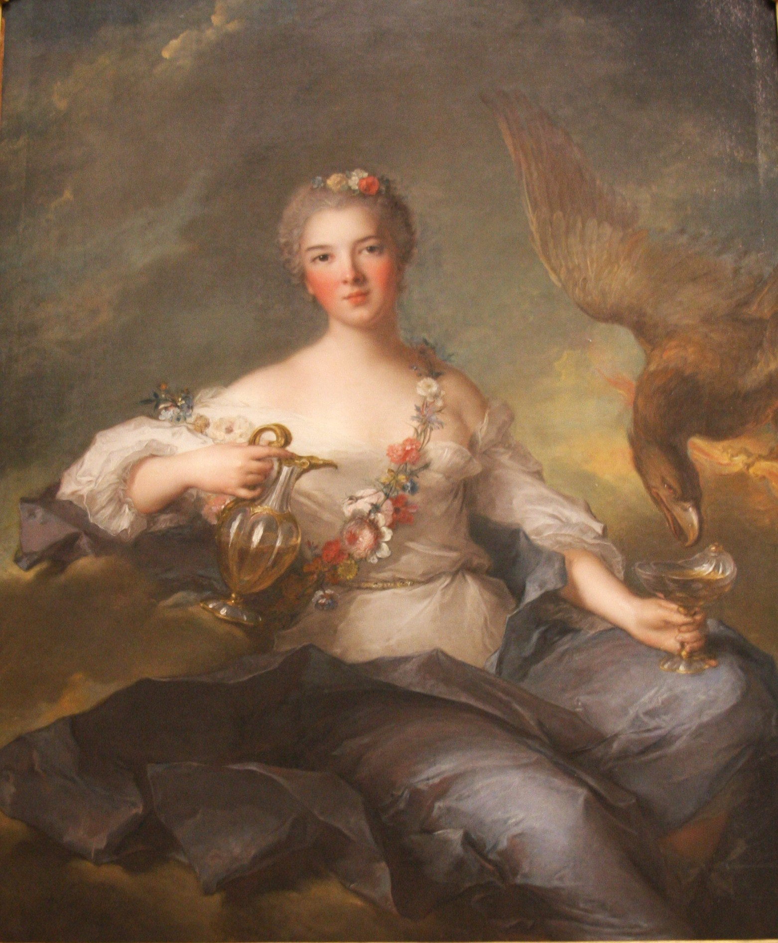 Louise Henriette de Bourbon (1726–1759), later Duchesse d'Orléans